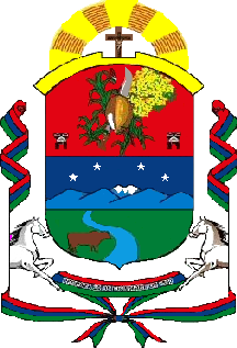 Escudo del municipio Pedraza. Estado Barinas. Venezuela